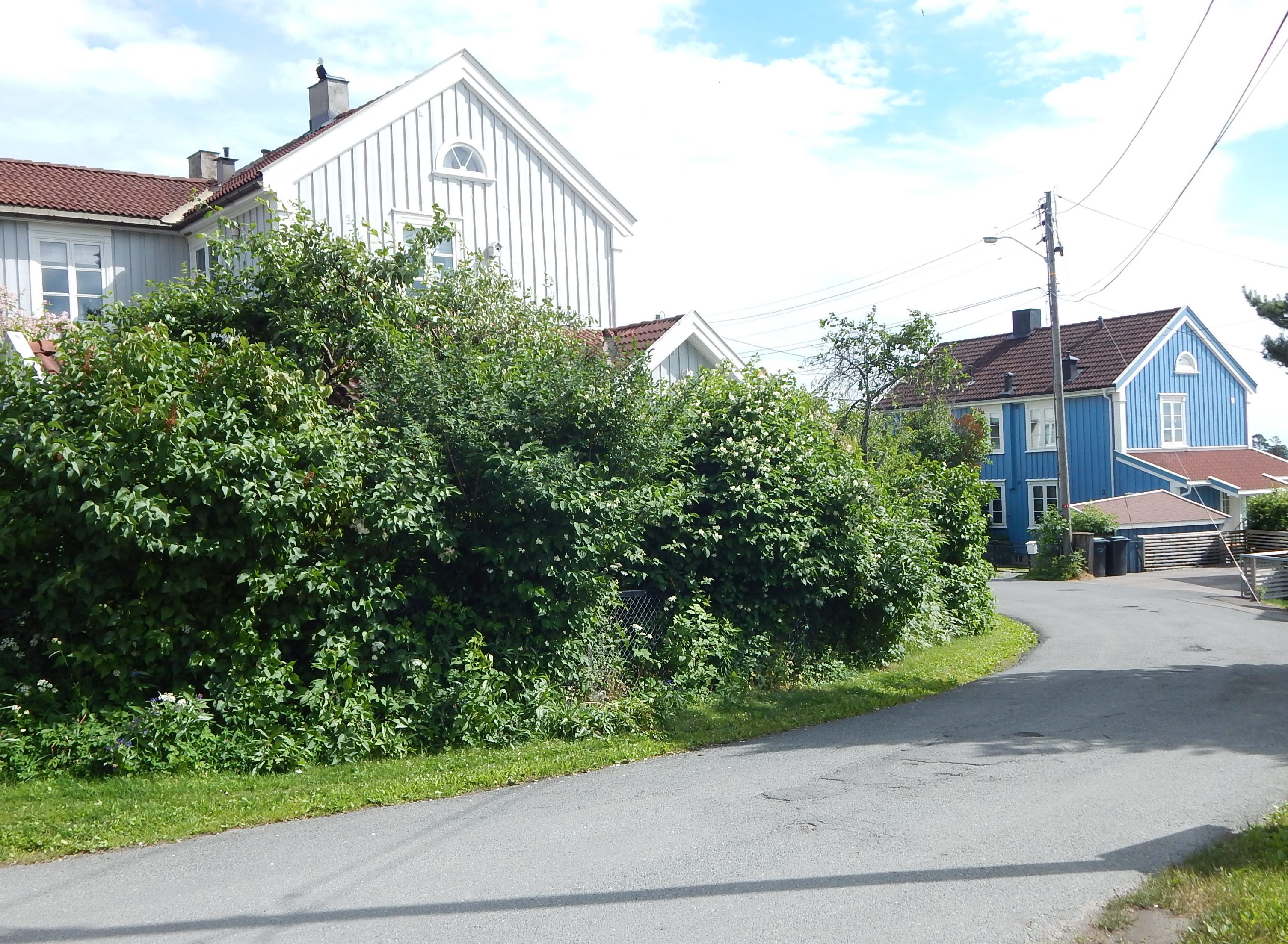 Einerveien